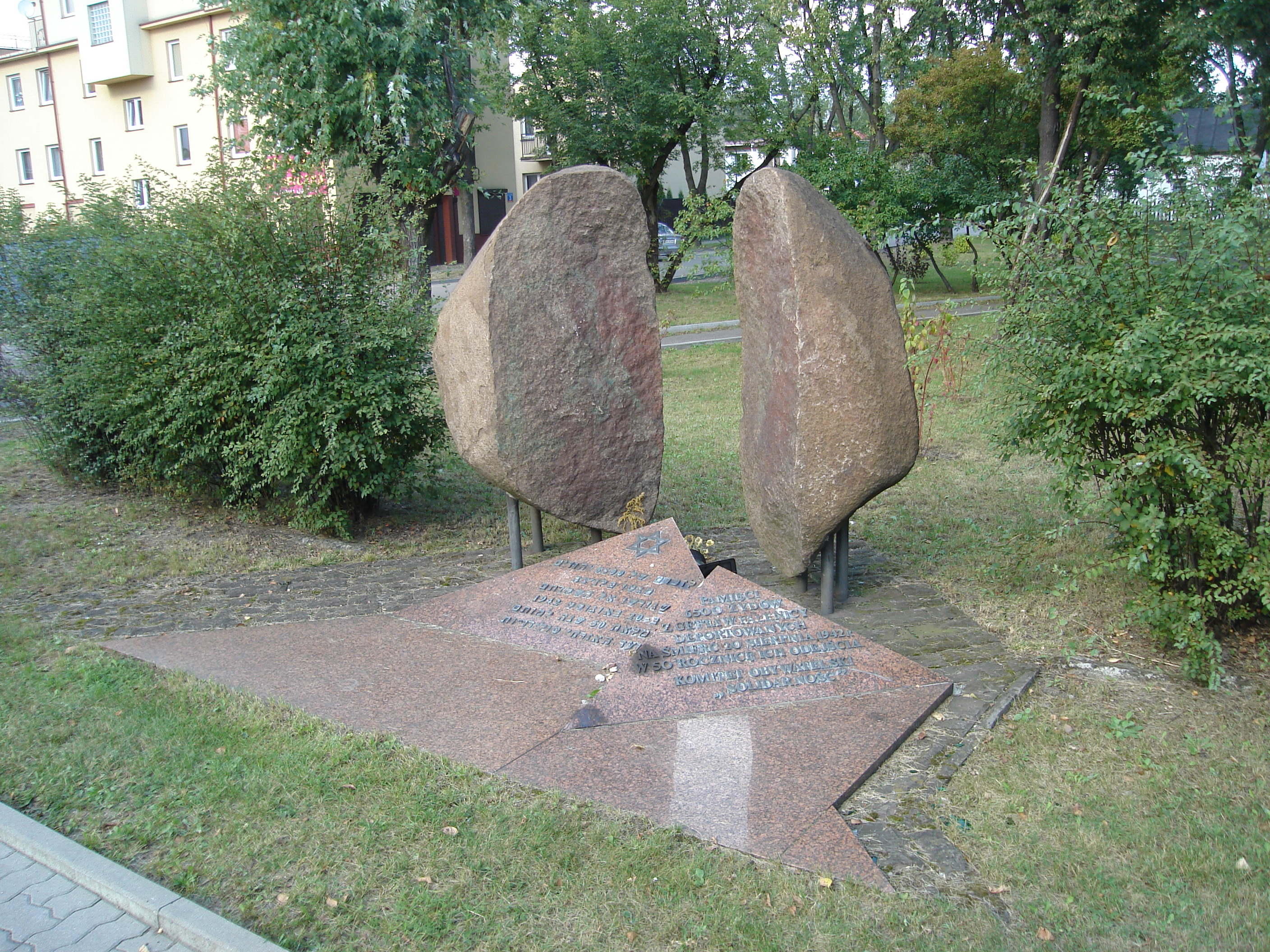 Pomnik poświęcony zamordowanym przez Niemców Żydom z falenickiego getta